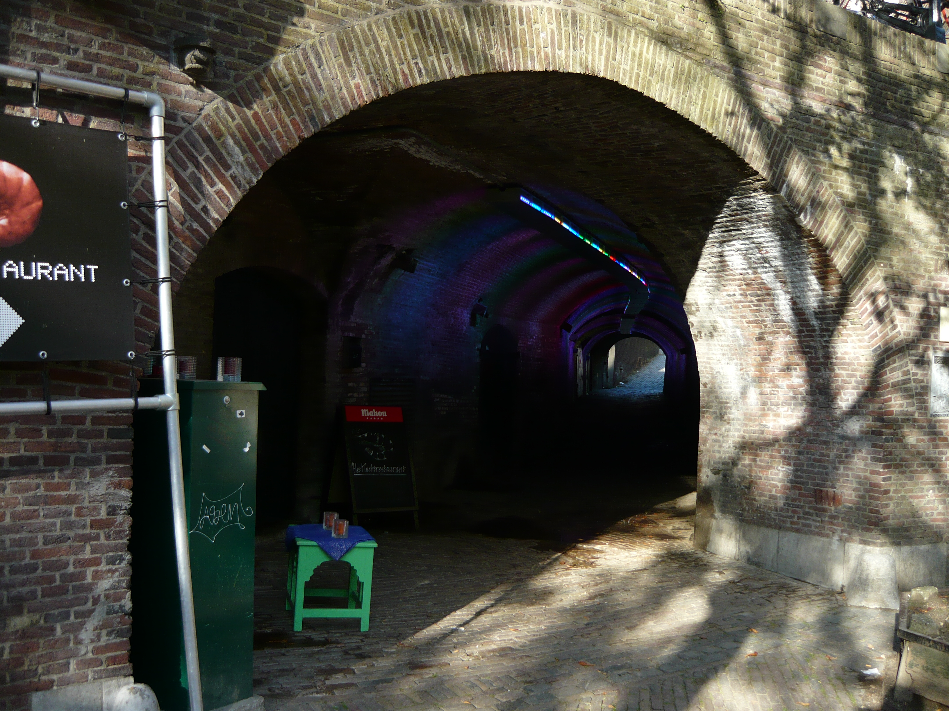 Wed naar de Ganzenmarkt vanaf de werf van de Oudegracht in Utrecht. 16″ N, 5° 07′ 08.54″ E